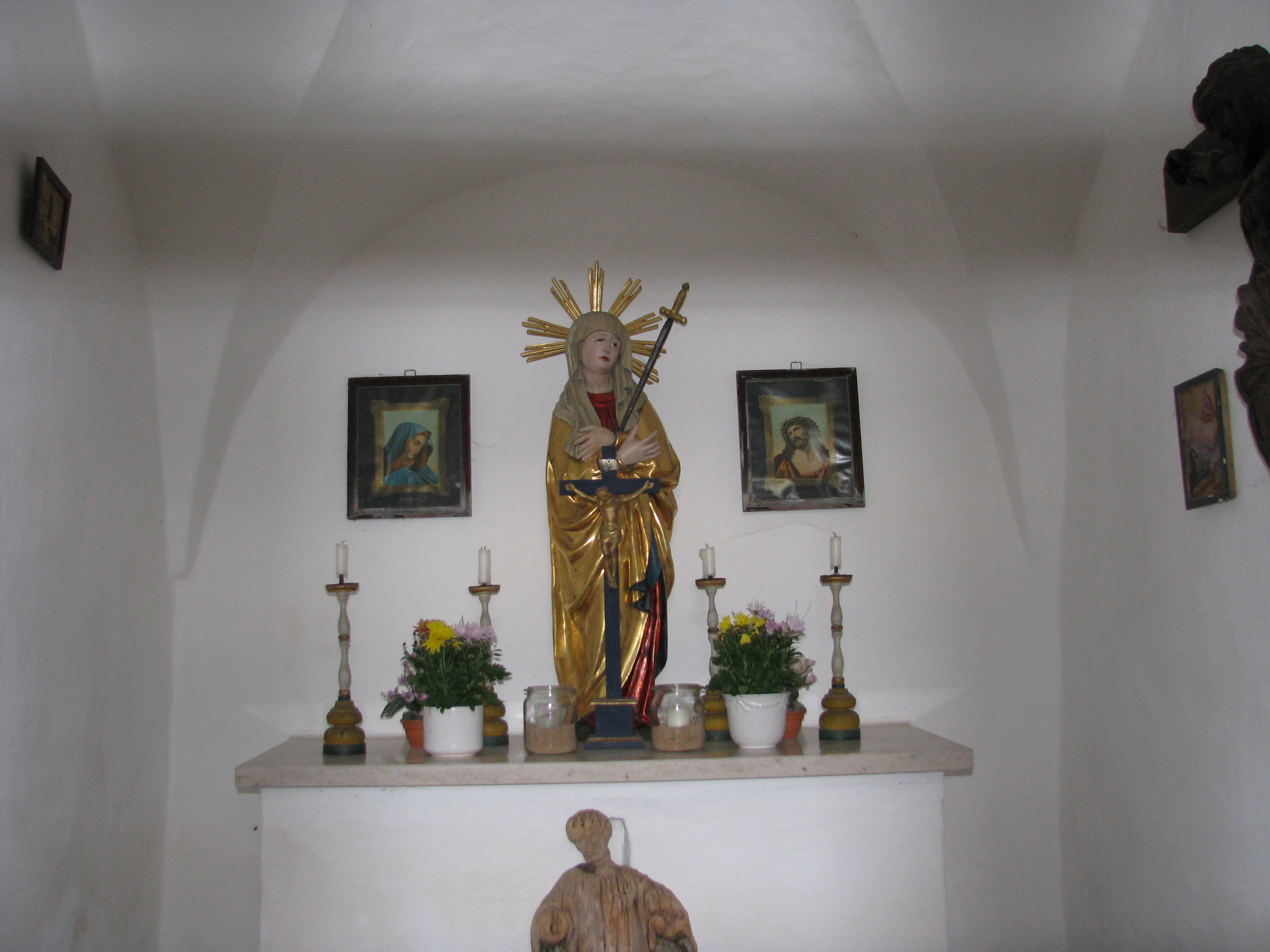 Jettenhofen, Ortsteil von Freystadt im Landkreis Neumarkt in der Oberpfalz, Kapelle Maria Dolorosa